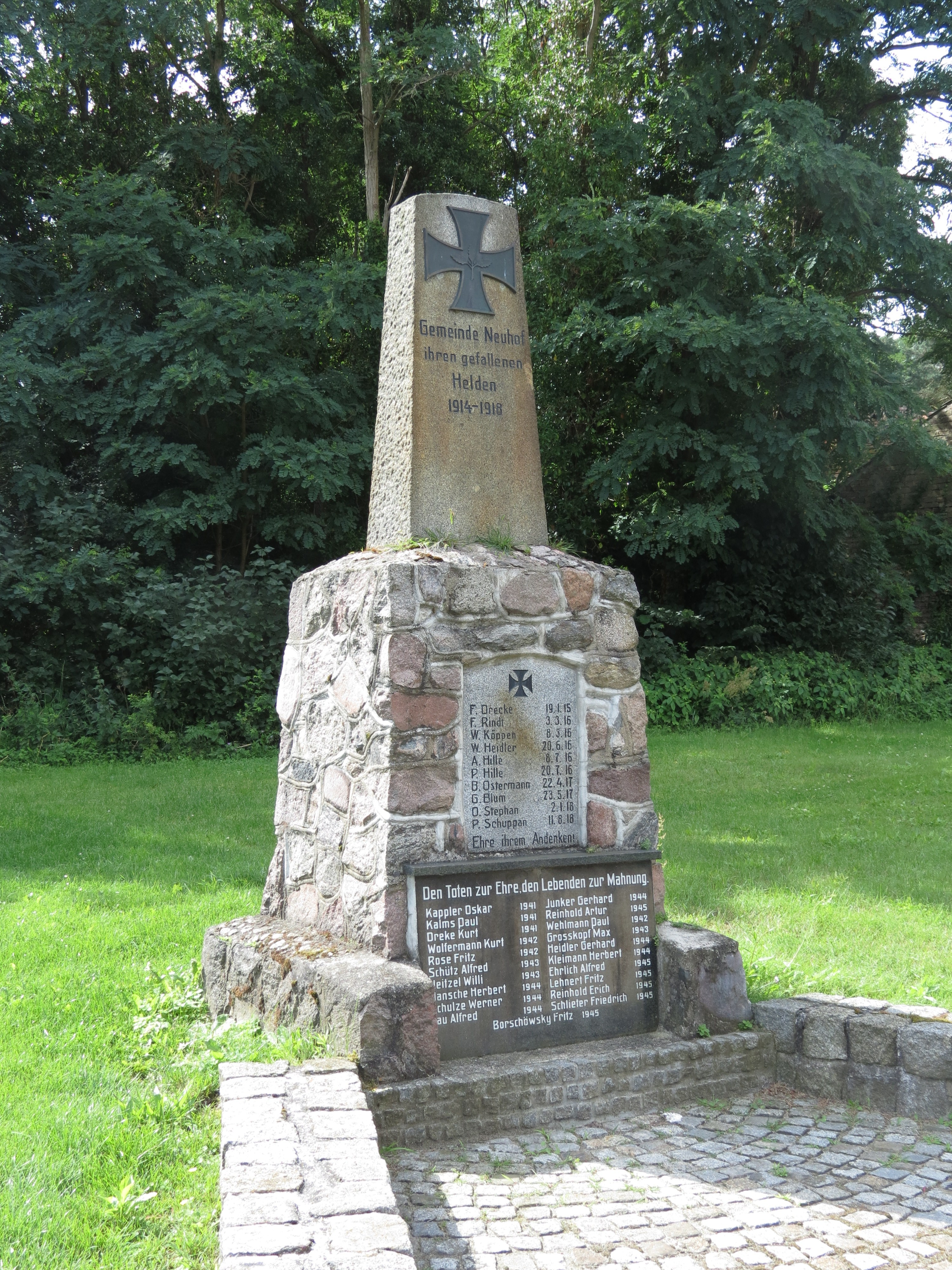 Kriegerdenkmal, Neuhof, Gemeindeteil der Stadt Zossen, Brandenburg, Deutschland